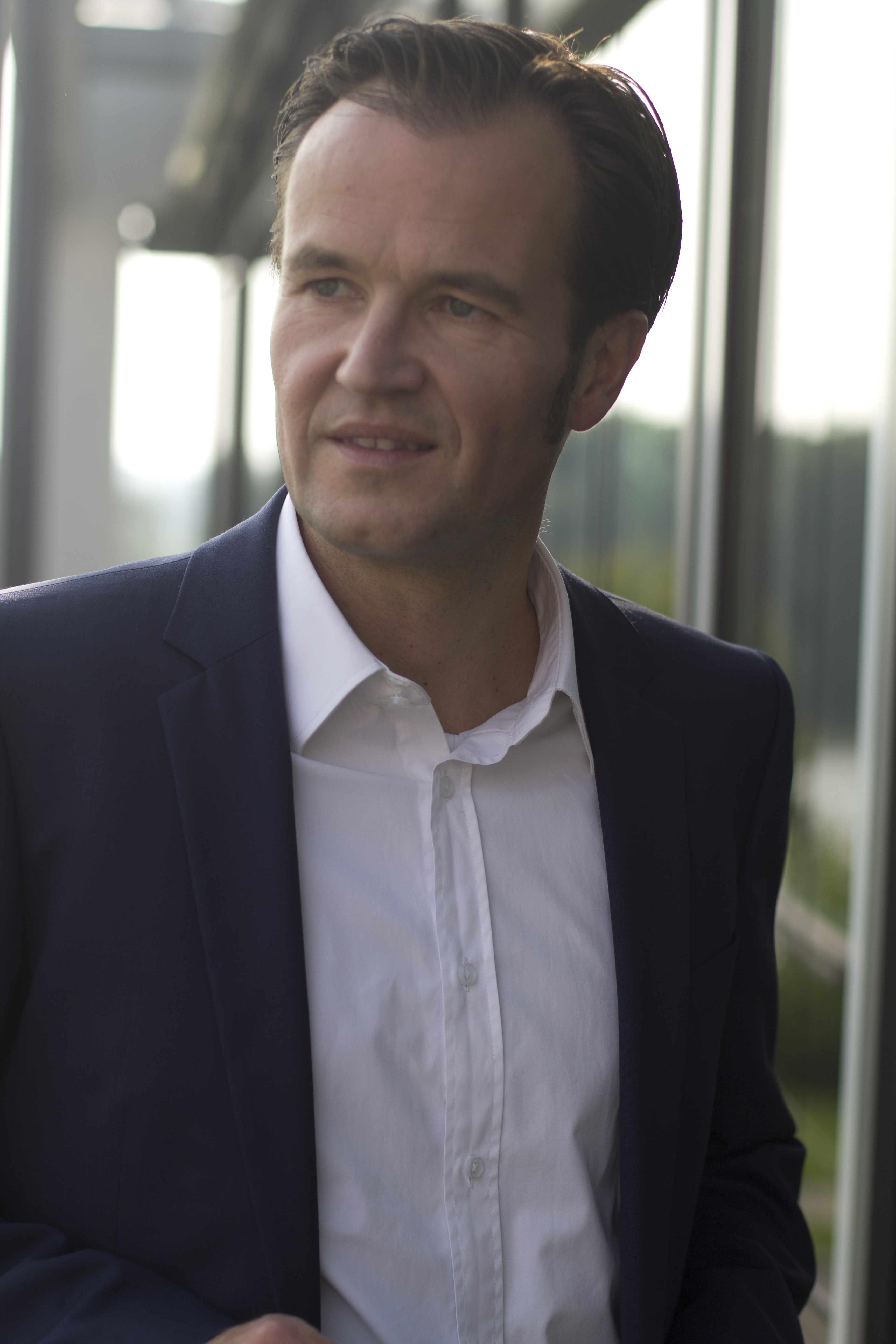 Prof. Dr. Oliver Kaul